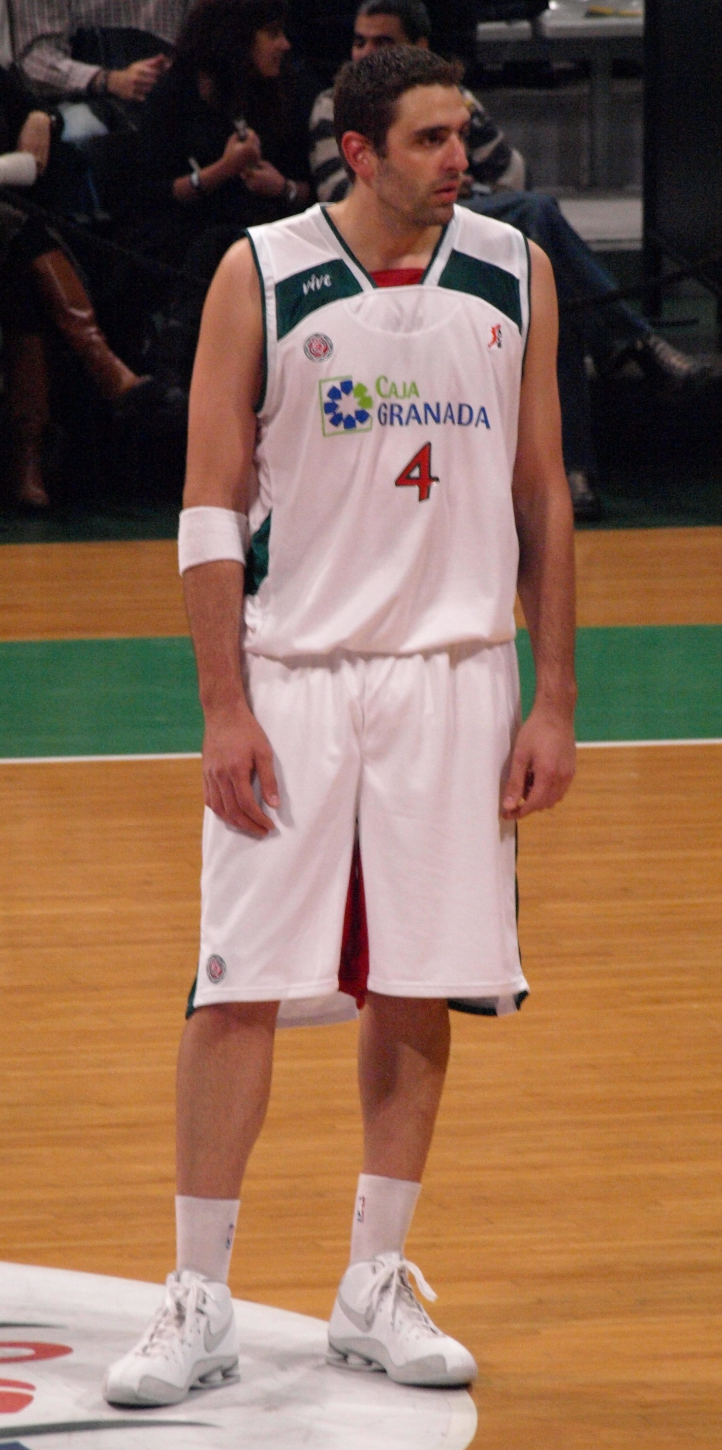 Juanpi Gutiérrez en el partido de primera vuelta de la liga ACB 2008/09 disputado en Olímpico de Badalona ante el DKV Joventut.